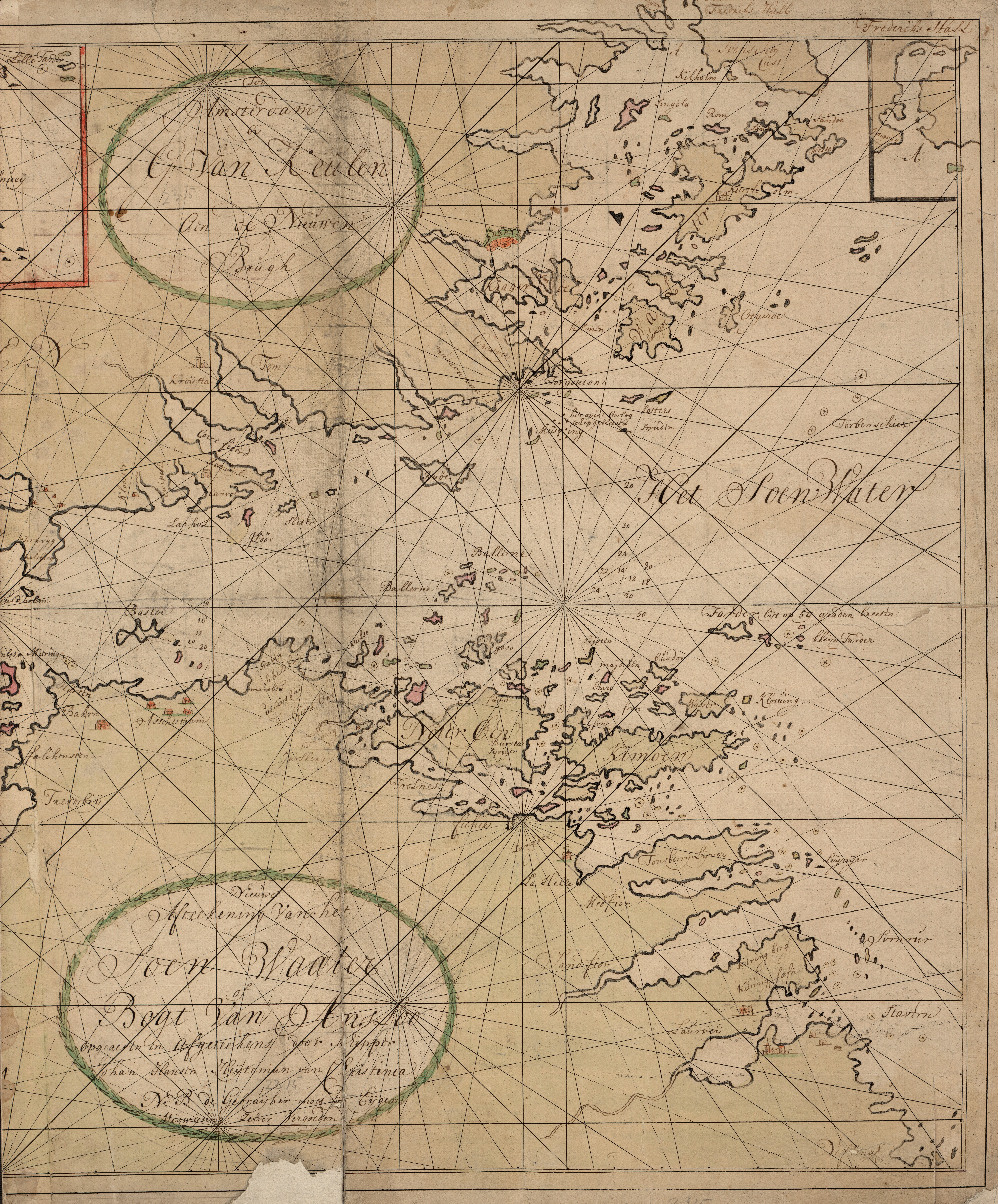 Kart fra Nasjonalbibliotekets kartsamling. Kartet er gitt ut i Håndtegnet (ca 1710) og viser Oslofjorden, kysten, sjøkart00641,00642.